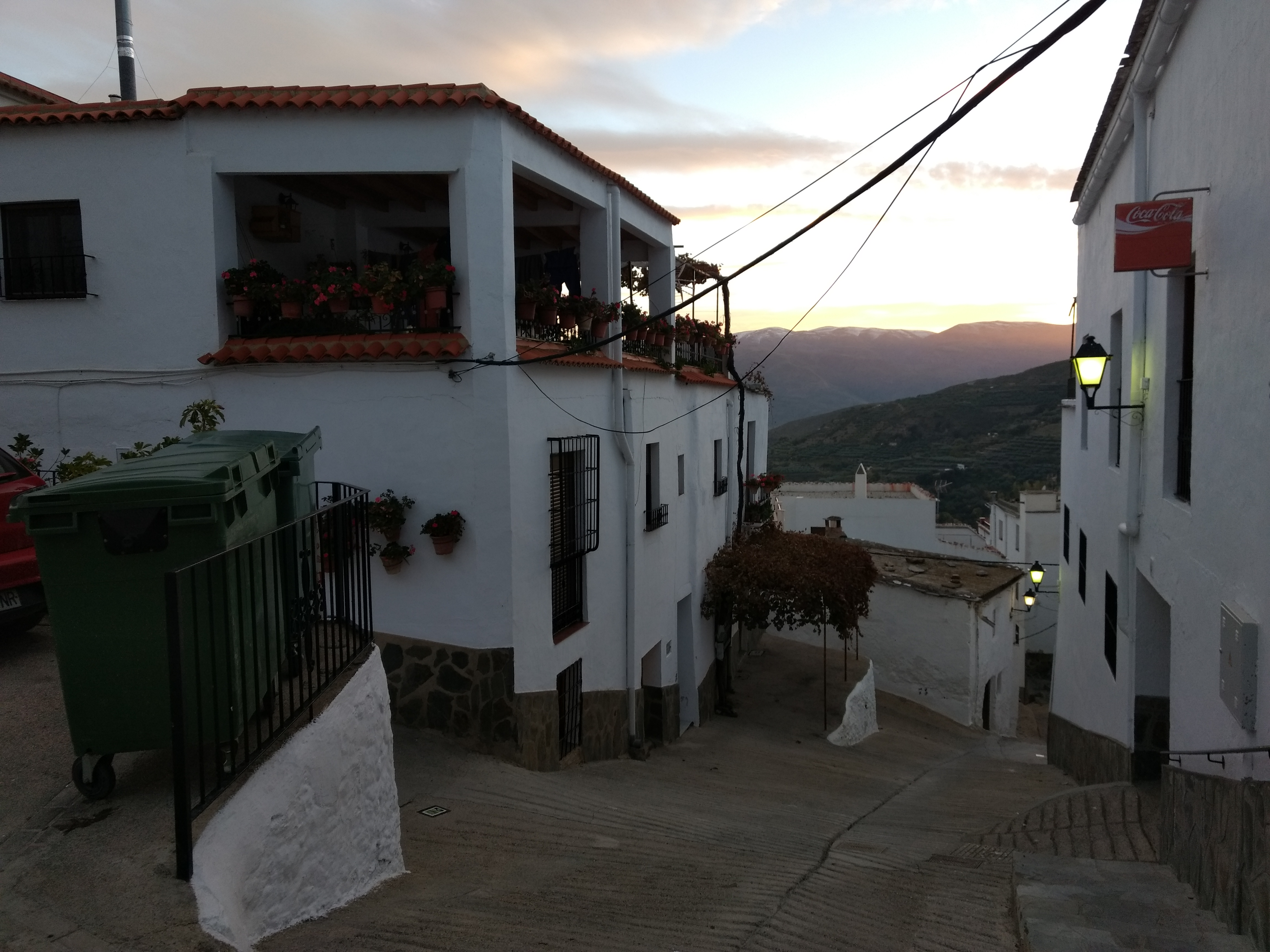 Ohanes (Almería)